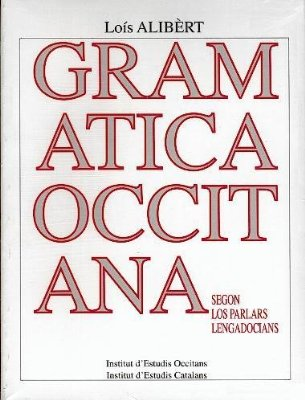 Gramatica occitana de Loís Alibèrt, reedicion IEO, 2000